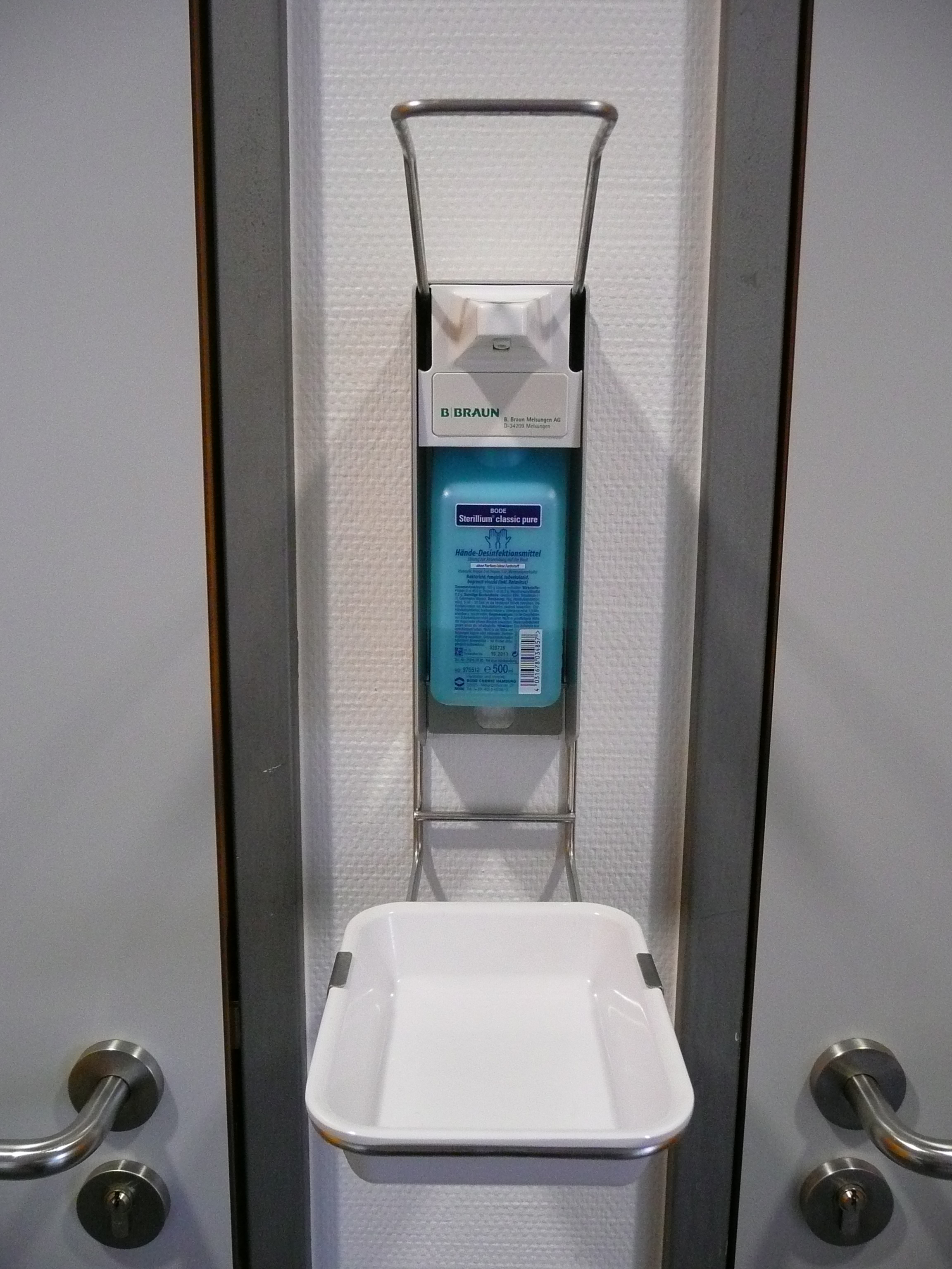 Spender der Firma B. Braun für Hände-Desinfektionsmittel "Sterillium classic pure"